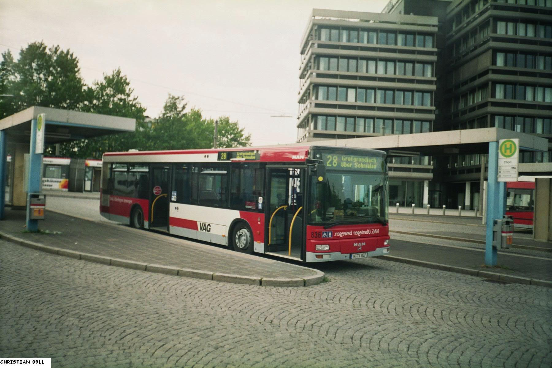 Vag Bus mit der Wagennummer 836 als Linie 28 an der Haltestelle Nürnberg-Thon.